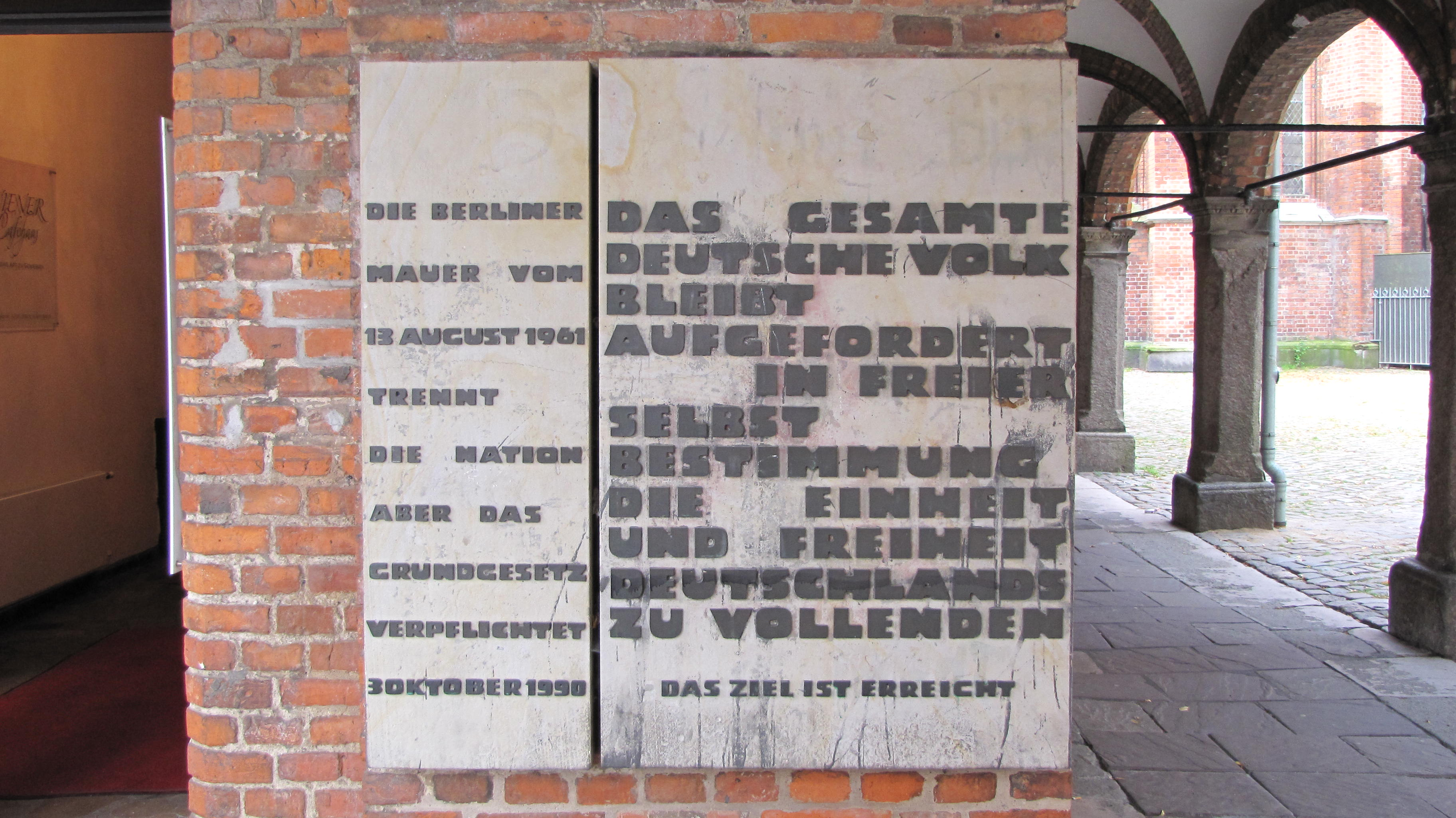 Erinnerungstafel "Wiedervereinigungsgebot" am Kanzleigebäude in Lübeck, 1974, von Herbert Müller-Fried, ergänzt 1993